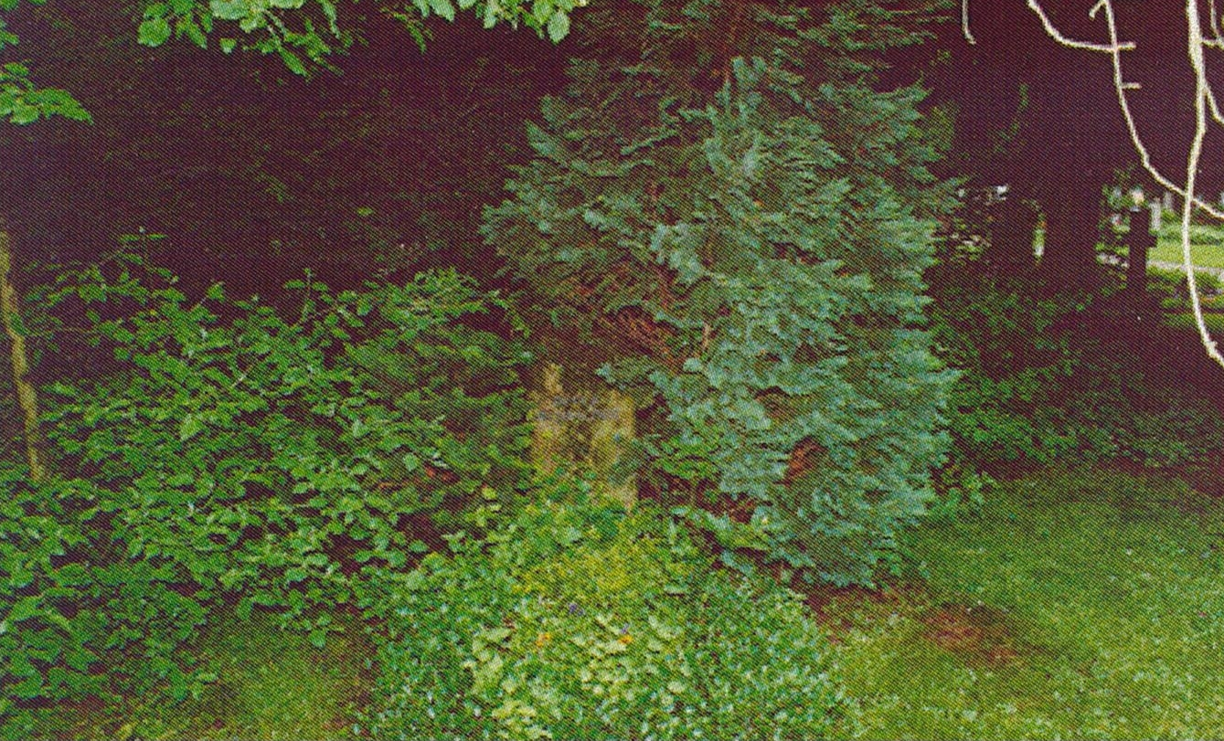 Friedhof Obermenzing-Peter Mosbacher